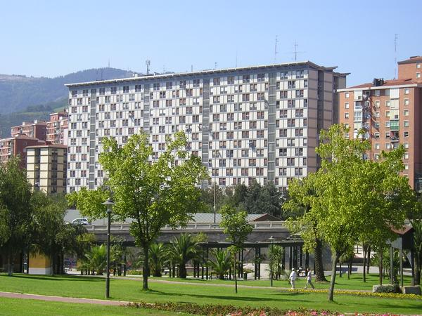 Ajedrez Eraikina Txurdinagatik ikusia.